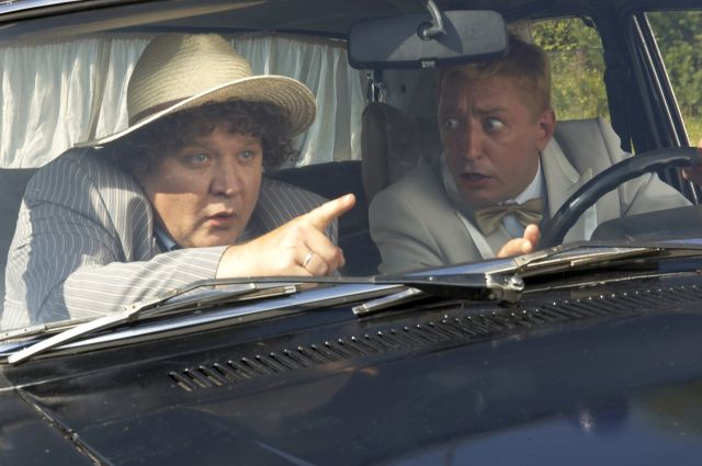 Роман Сергеевич Мадянов на съёмках кинокомедии «Святое дело»